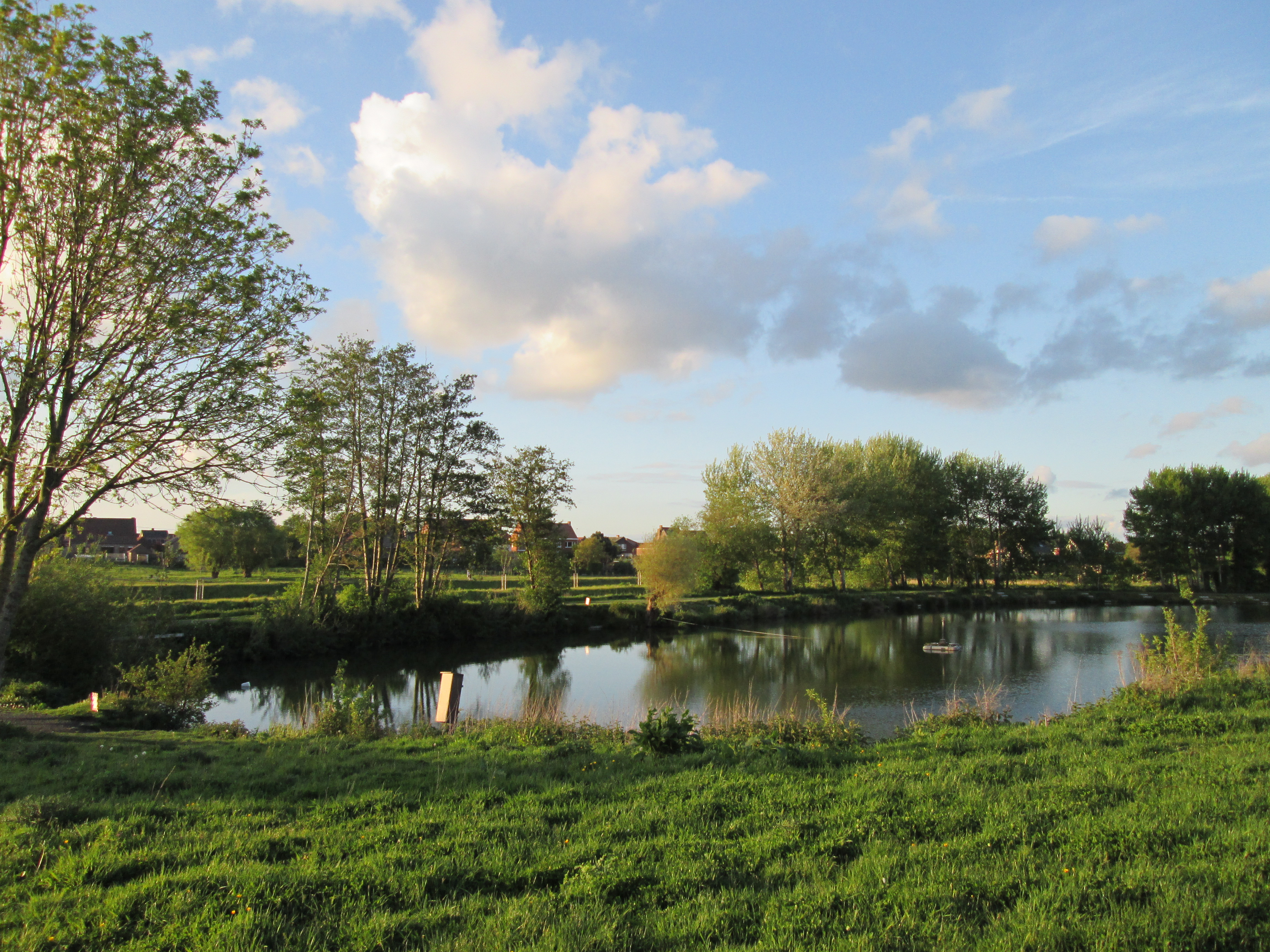 De statieput wordt nu gebruikt als visvijver. Vroeger diende deze put als waterreservoir voor stoomlocomotieven.